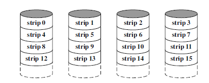 RAID 0